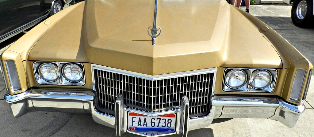 Seen at the Ohio Valley Street Rodders Cruise-in in Wheelersburg, Ohio.